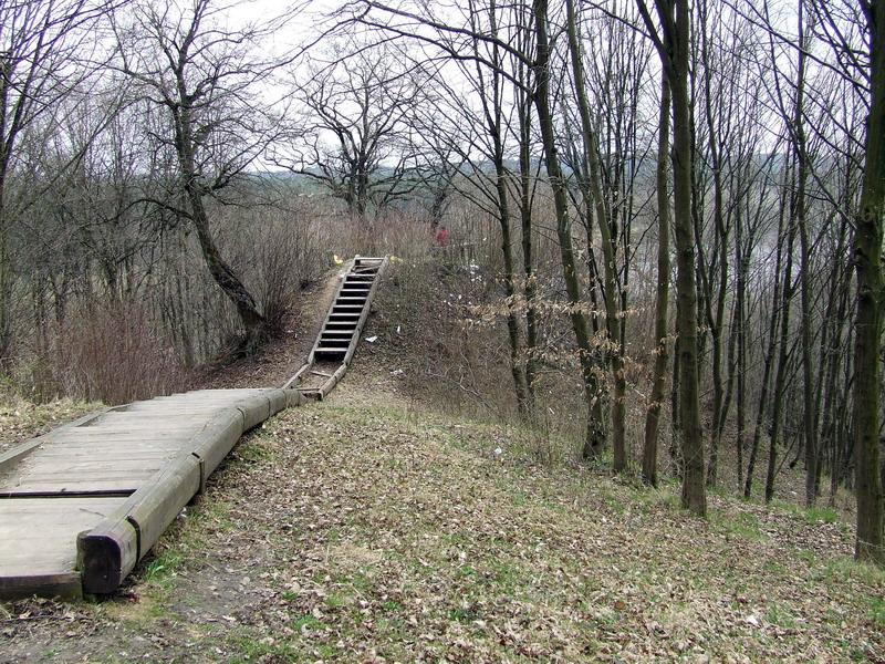 Aukštųjų Šančių piliakalnis.